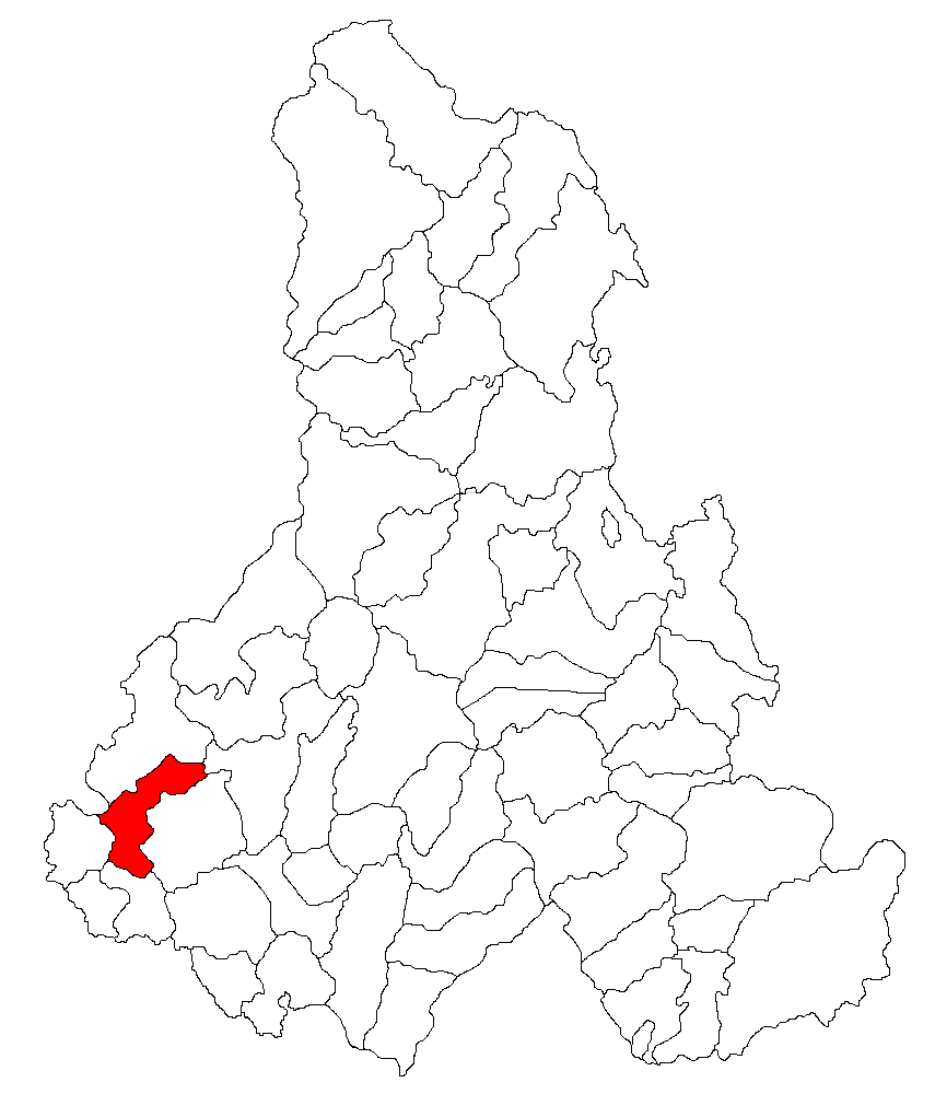 Categorie:Hărţi ale judeţului Harghita Contents 1 Licensing 2 Sursă 3 Licensing 4 Original upload log Licensing Sursă ro::Imagine:Harta_jud_Harghita.png